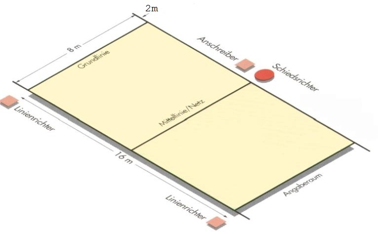 Beschriftung der Linienrichter, des Anschreibers und des Schiedsrichters.